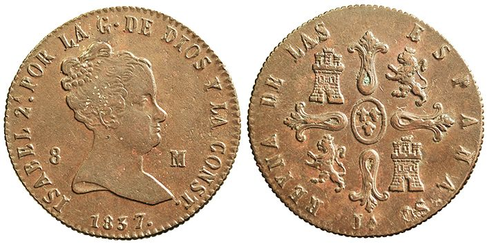 ISABEL II. 8 Maravedís. AE. Jubia. 1837. Cal.475. MBC+.